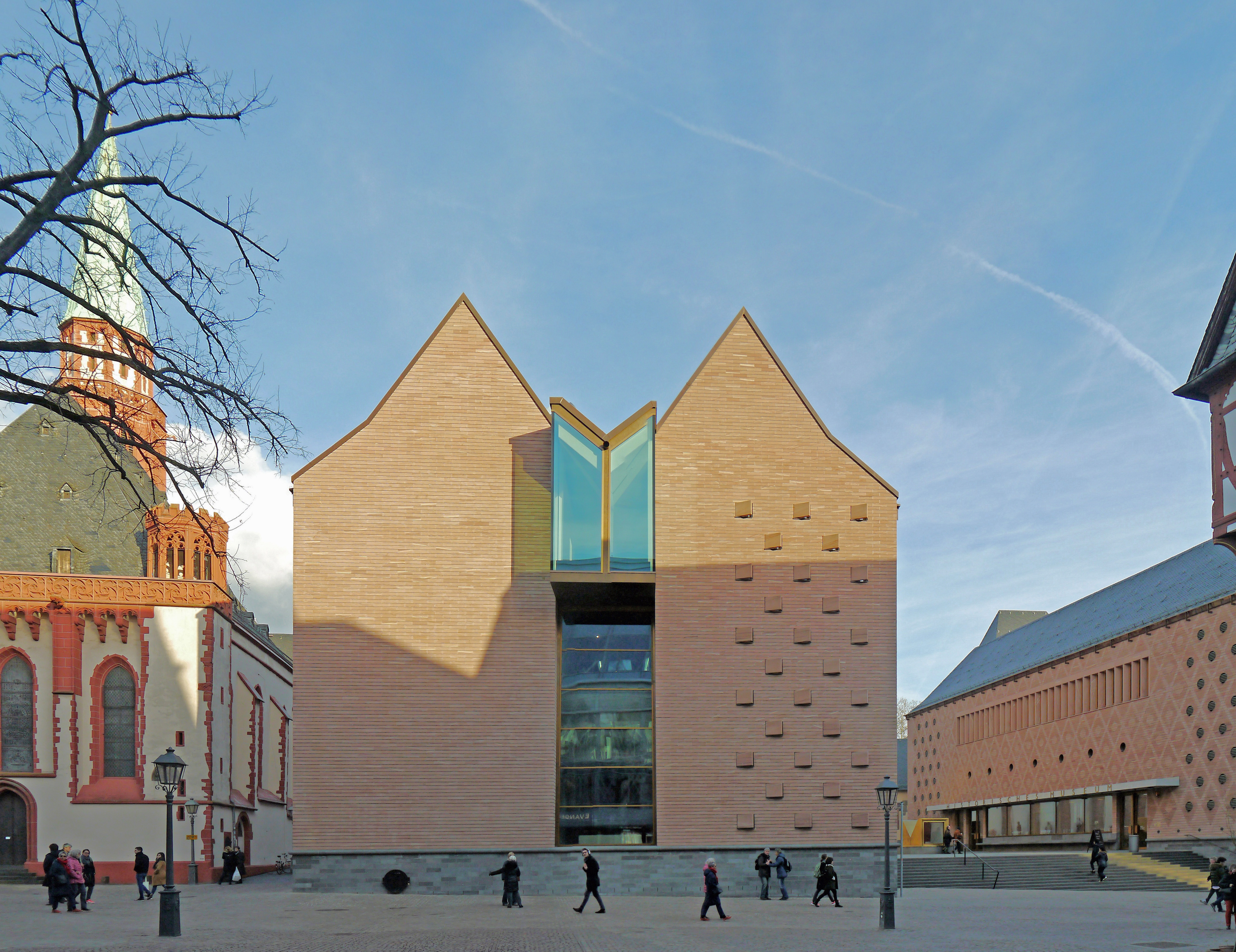 Das Historische Museum Frankfurt (2018) von Osten (Eingangsseite) aus.